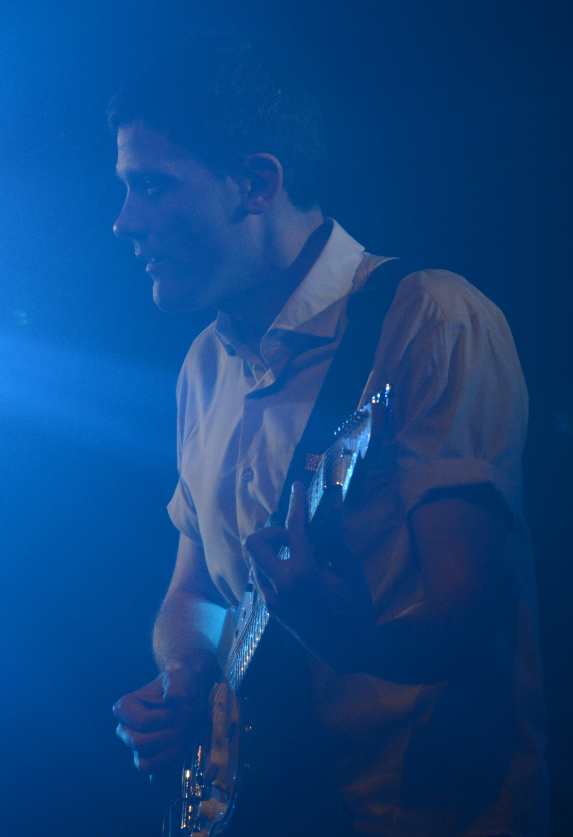 Concierto en El Galpón, Montevideo